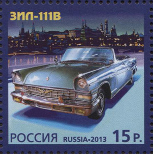 Совместный выпуск Российской Федерации и Княжества Монако. История автомобилестроения